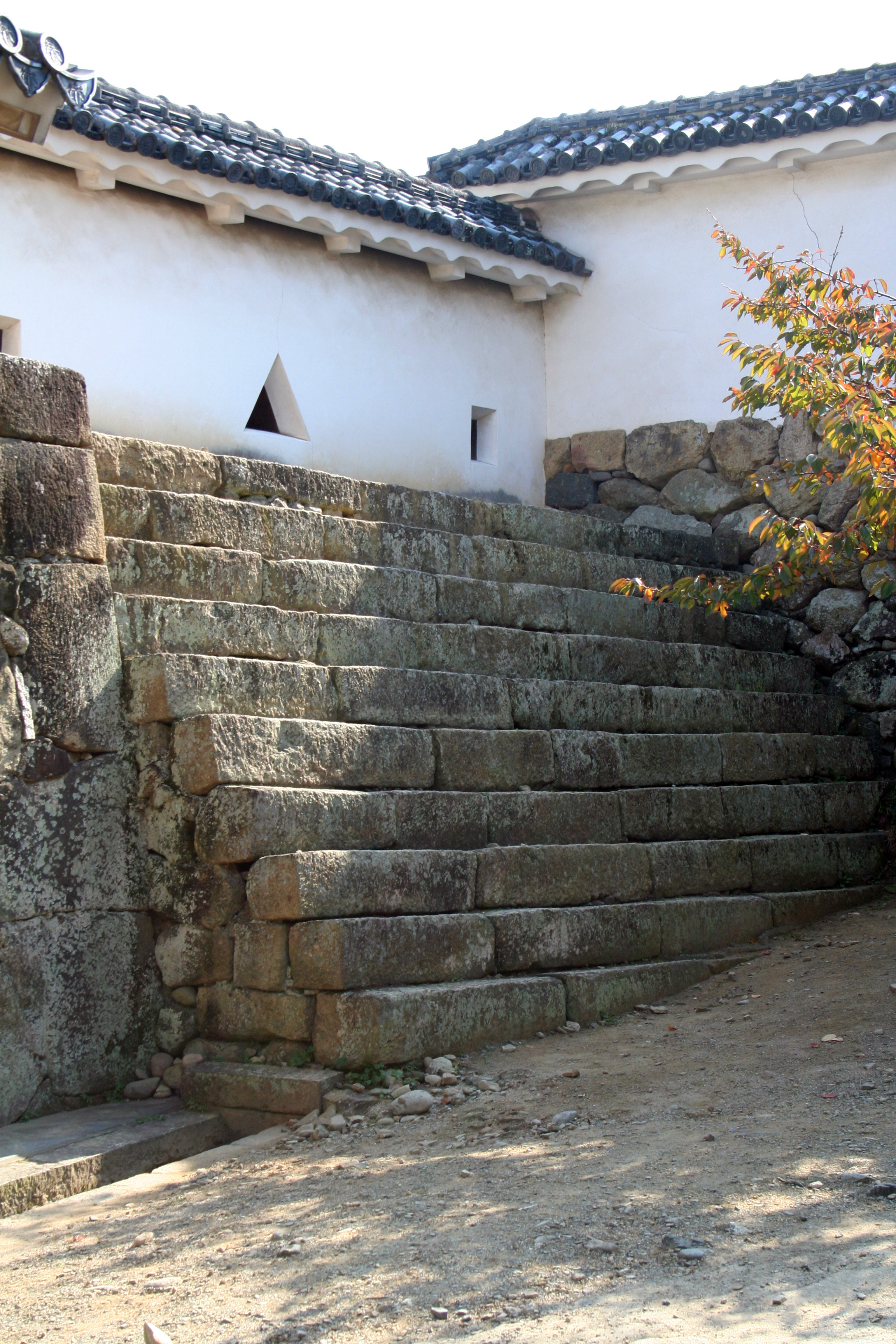 2009年秋の姫路城。 菱の門の西側にある射撃台。ここから菱の門前に迫ってきた敵兵を狙撃するようになっていた。